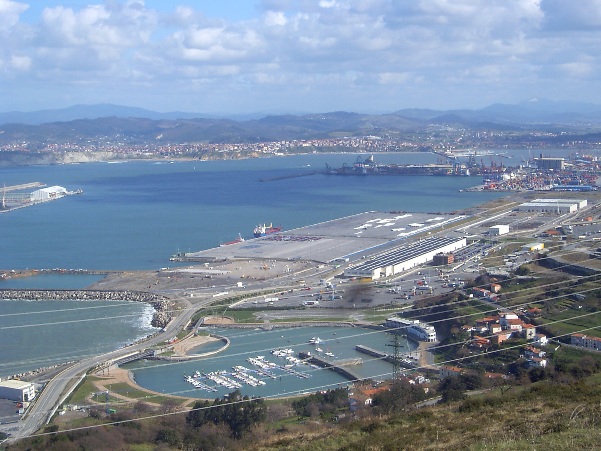 Bilbo merkatal portua. Bilboko itsasadarra